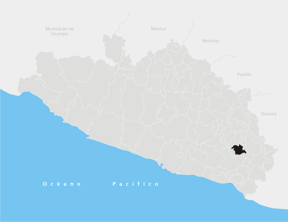 Iliatenco en el estado de Guerrero (México)